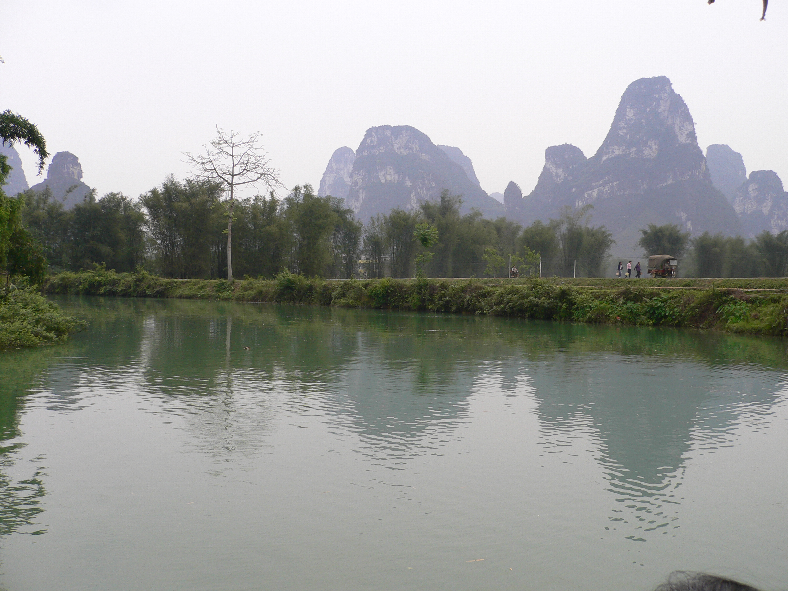 明仕田園, 廣西省